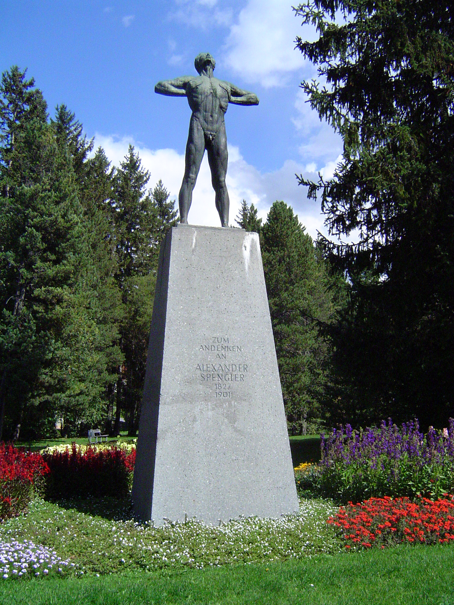 Davos, statue Alexander Spengler, sculptor: Philip Modrow